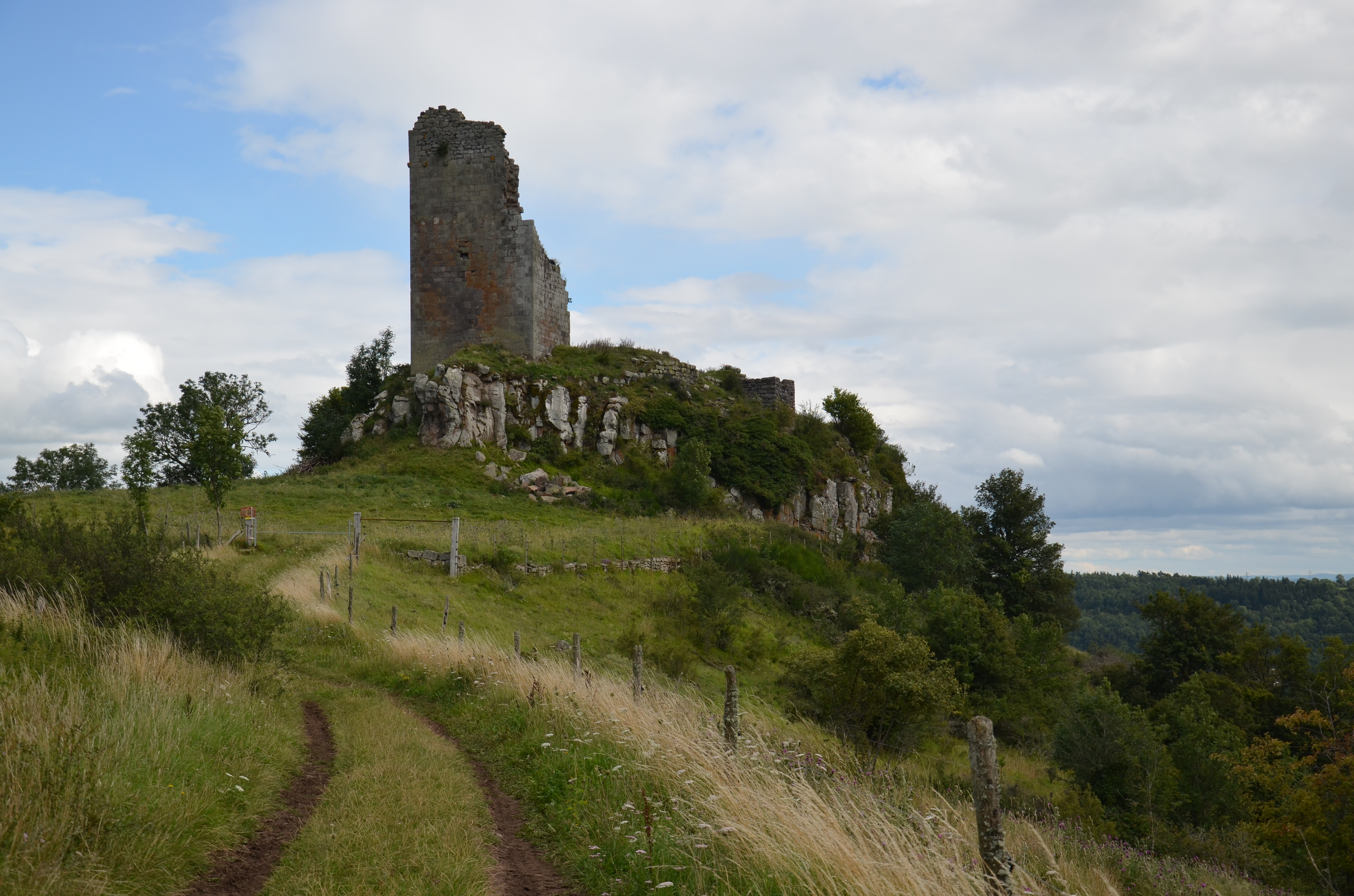 Vue générale sur le Château de Mardogne .